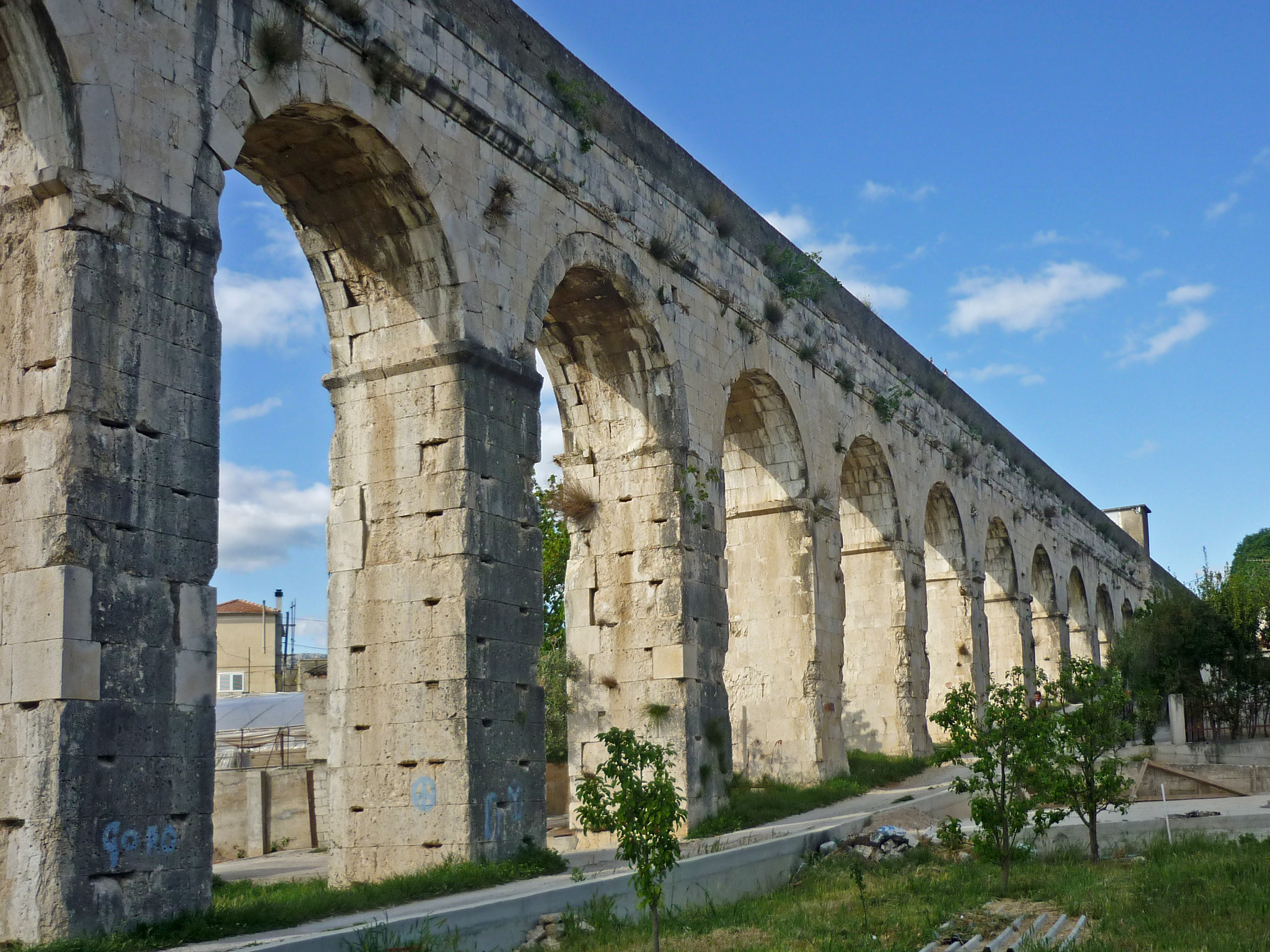 Diokletian-Aquädukt in Split (errichtet um 300)